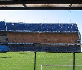 Segunda bandeja de la popular de boca juniors , actualmente ahi esta su barrabrava.